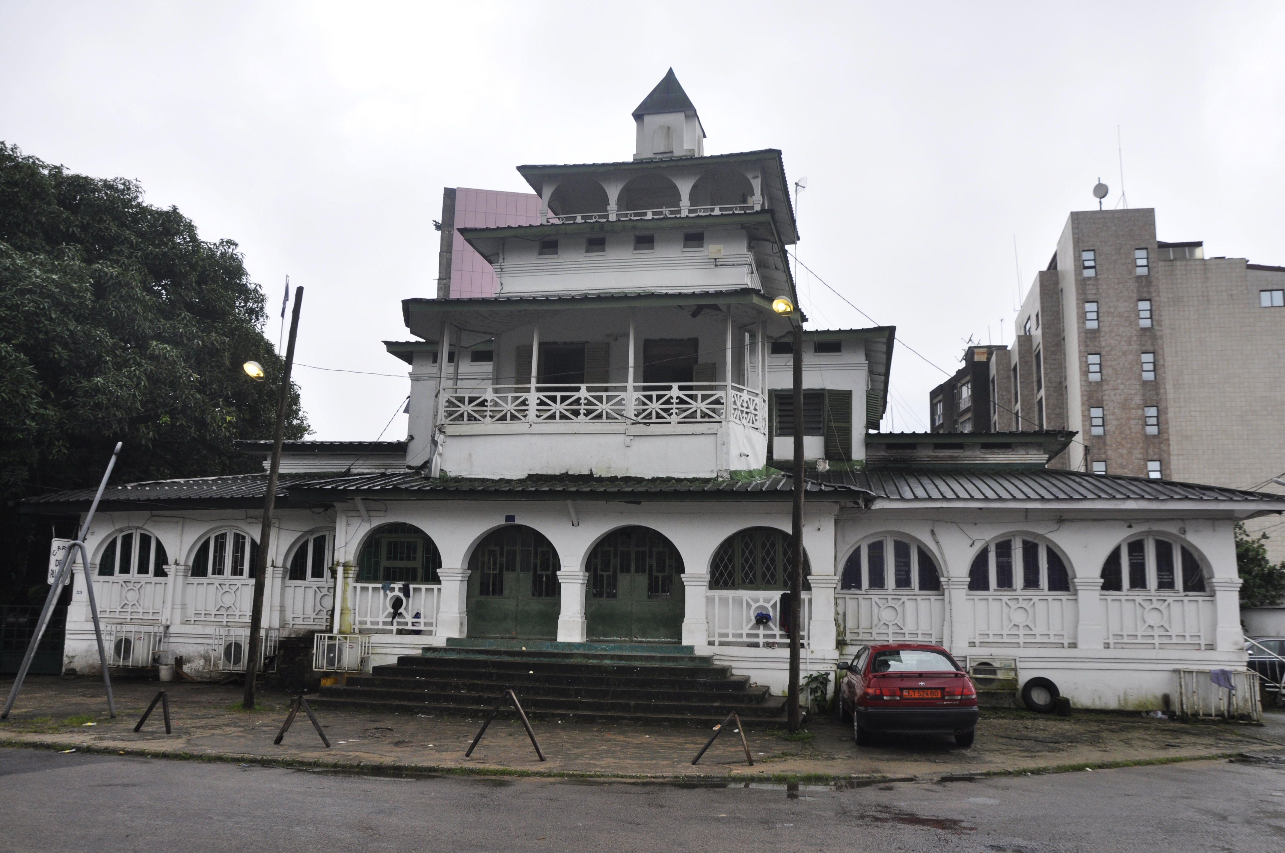 Palais des rois Bell